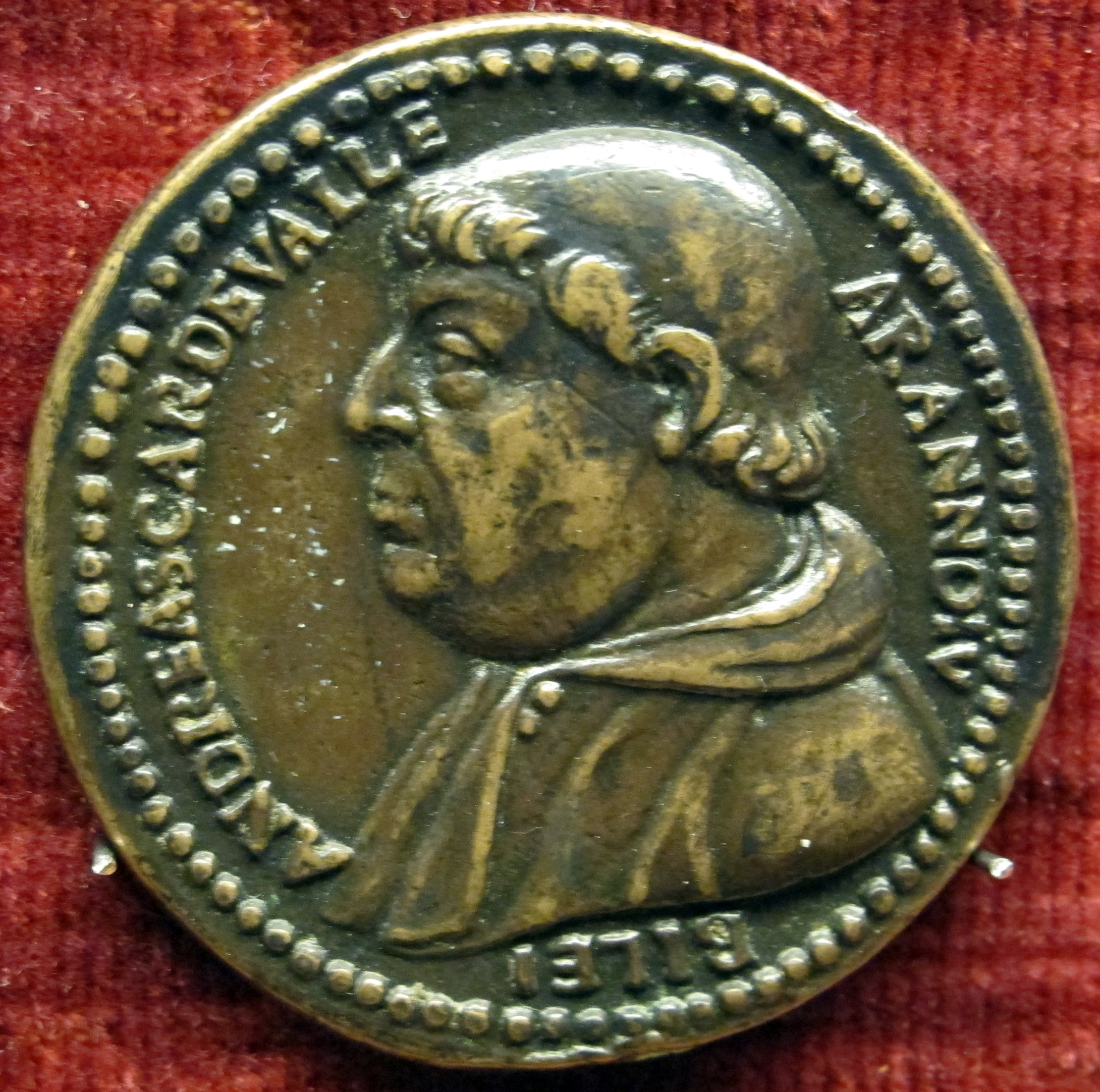 Medaglia di Andrea della Valle (1463-1534), cardinale